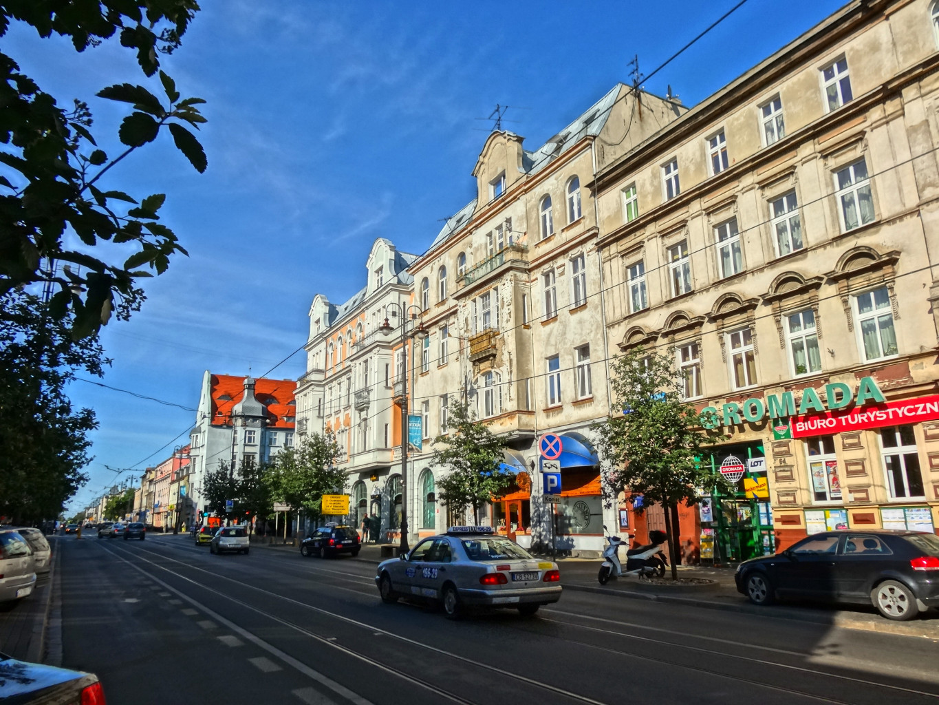 Ulica Gdańska w Bydgoszczy na odcinku między ul. Śniadeckich, a ul. Cieszkowskiego